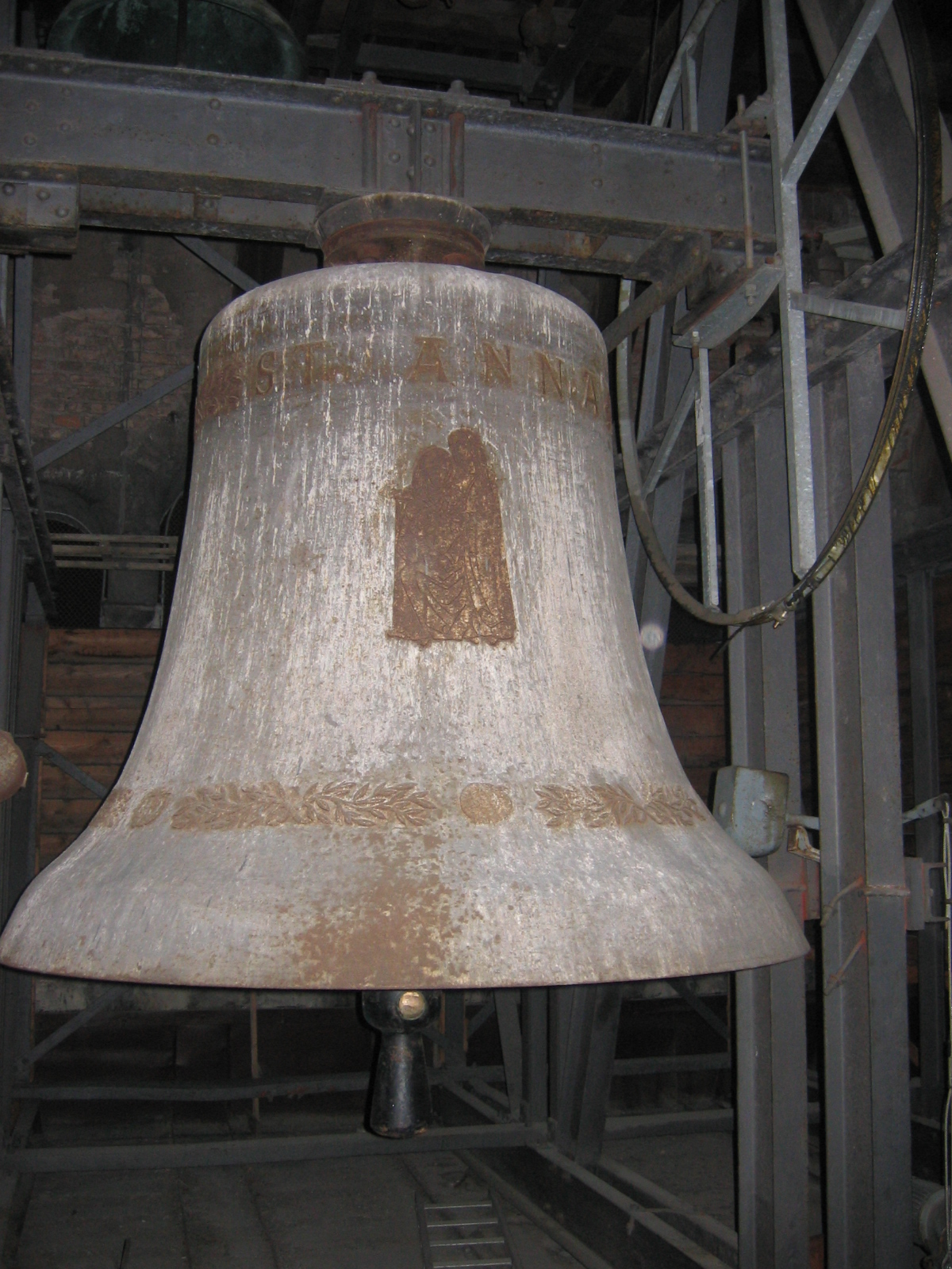 Die große Annenglocke von St. Anna in München-Lehel.